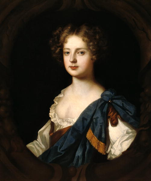 Portrait of Nell Gwynne